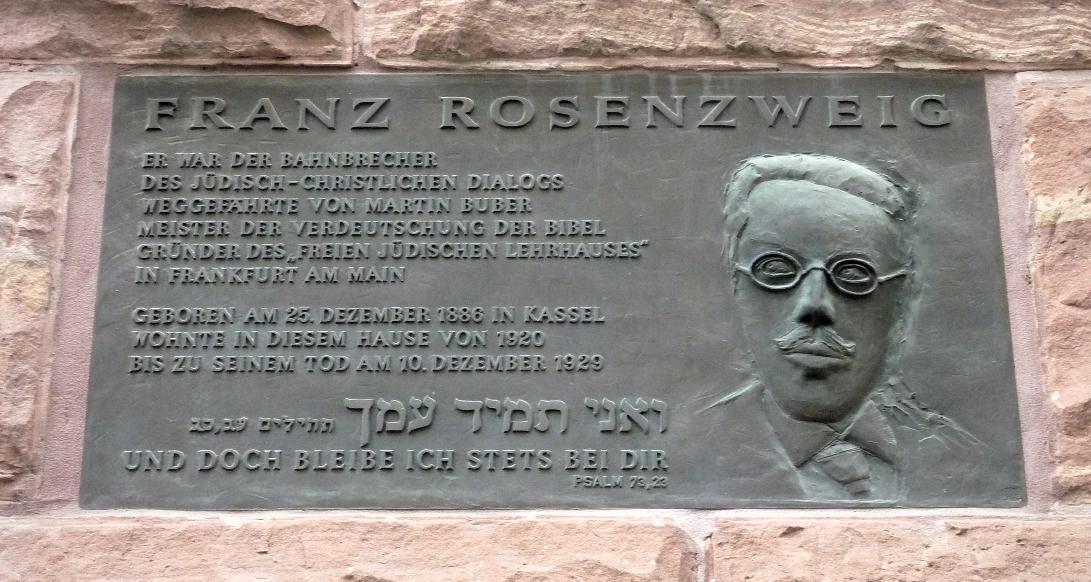 Gedenktafel für Franz Rosenzweig (1886–1929, Historiker und Philosoph) an seinem Wohnhaus im Stadtteil Westend-Süd in Frankfurt am Main. Enthüllt am 29. April 1993. Bronzetafel mit Portrait, 40x70 cm, gestaltet von Günter Maniewski. Inschrift der Gedenktafel (Interpunktion hier teilweise ergänzt): „Franz Rosenzweig. Er war der Bahnbrecher des jüdisch-christlichen Dialogs, Weggefährte von Martin Buber, Meister der Verdeutschung der Bibel, Gründer des „Freien jüdischen Lehrhauses“ in Frankfurt am Main. Geboren am 25. Dezember 1886 in Kassel, wohnte in diesem Hause von 1920 bis zu seinem Tod am 10. Dezember 1929. (Psalmtext in Hebräisch) Und doch bleibe ich stets bei dir (Psalm 73,23)“